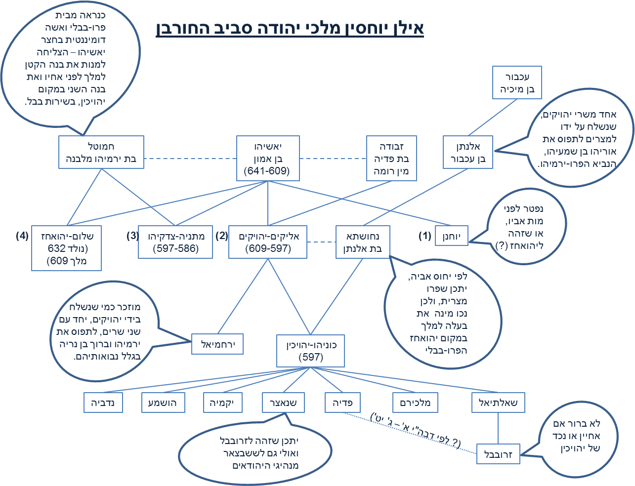 בני המלוכה ביהודה סביב החורבן עד לשיבת ציון, על פי התיאור המקראי